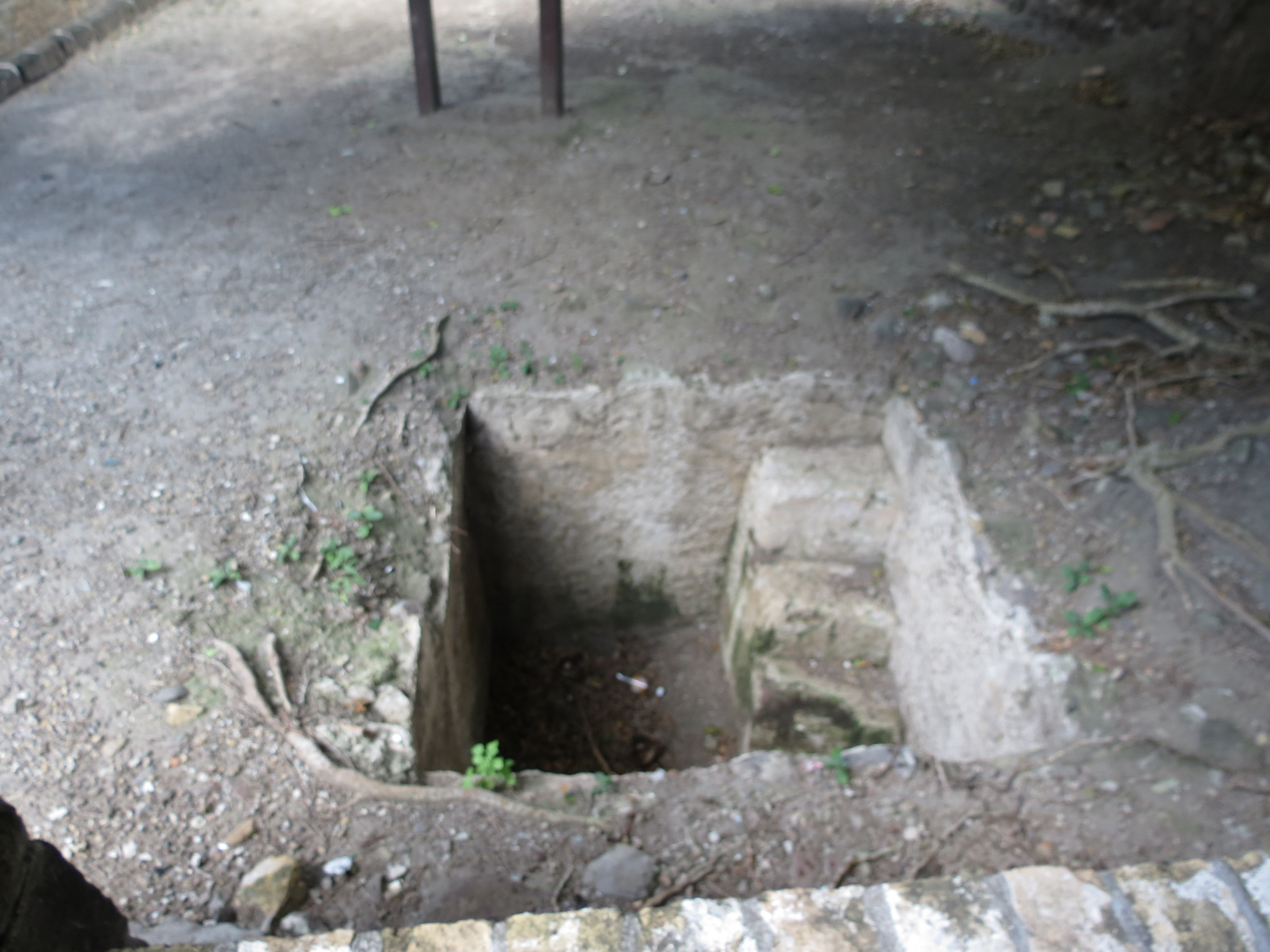 Mikwe van de Honen Dalim Synagoge in Sint Eustatius